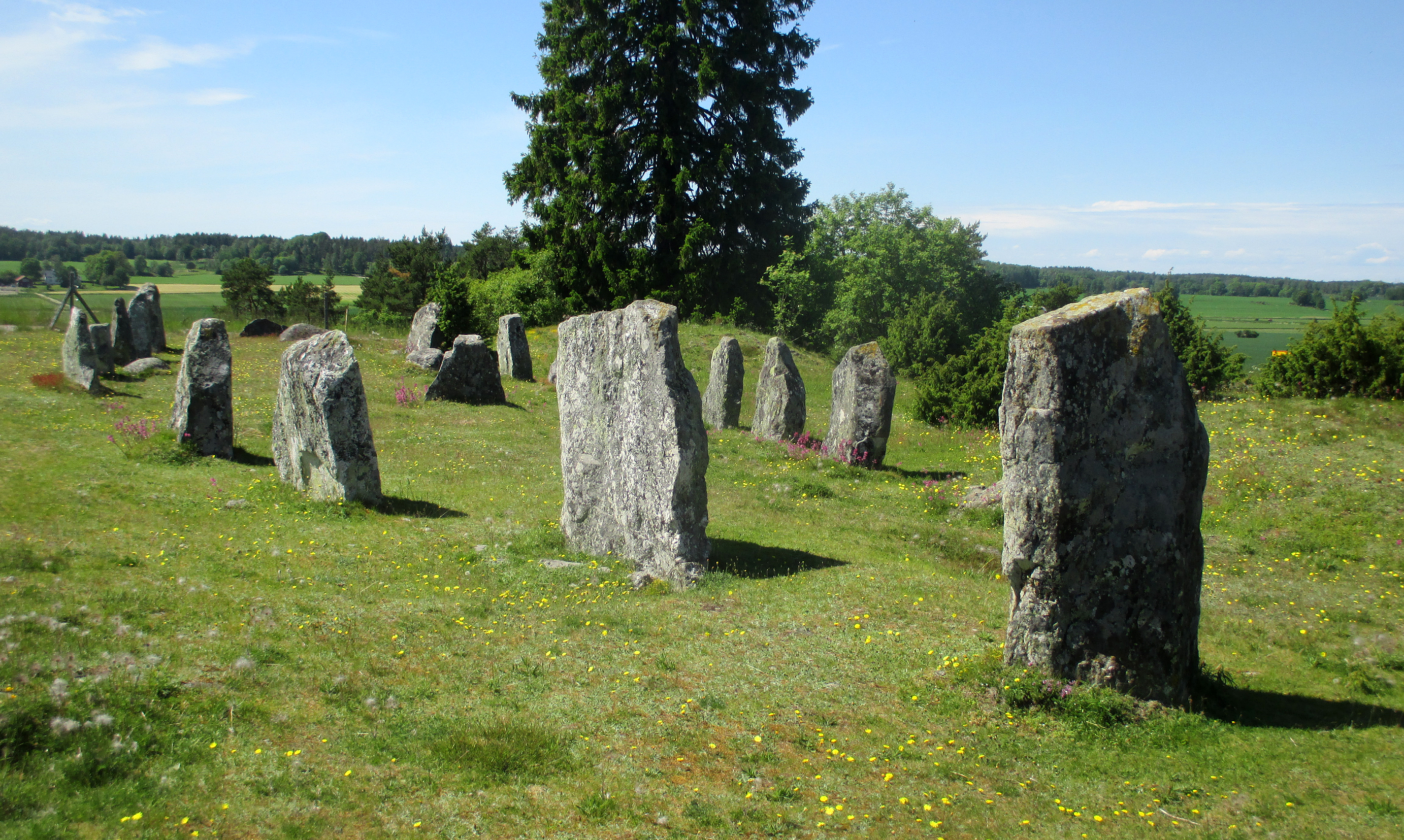 Åsa gravfält (RAÄ-nummer Ytterselö 123:1) i Ytterselö socken, Selaön, Selebo härad, Strängnäs kommun, Södermanlands län, Södermanland, Sverige.